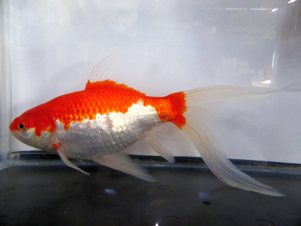 庄内金魚明け3歳の雌。飼育しているものを撮影。